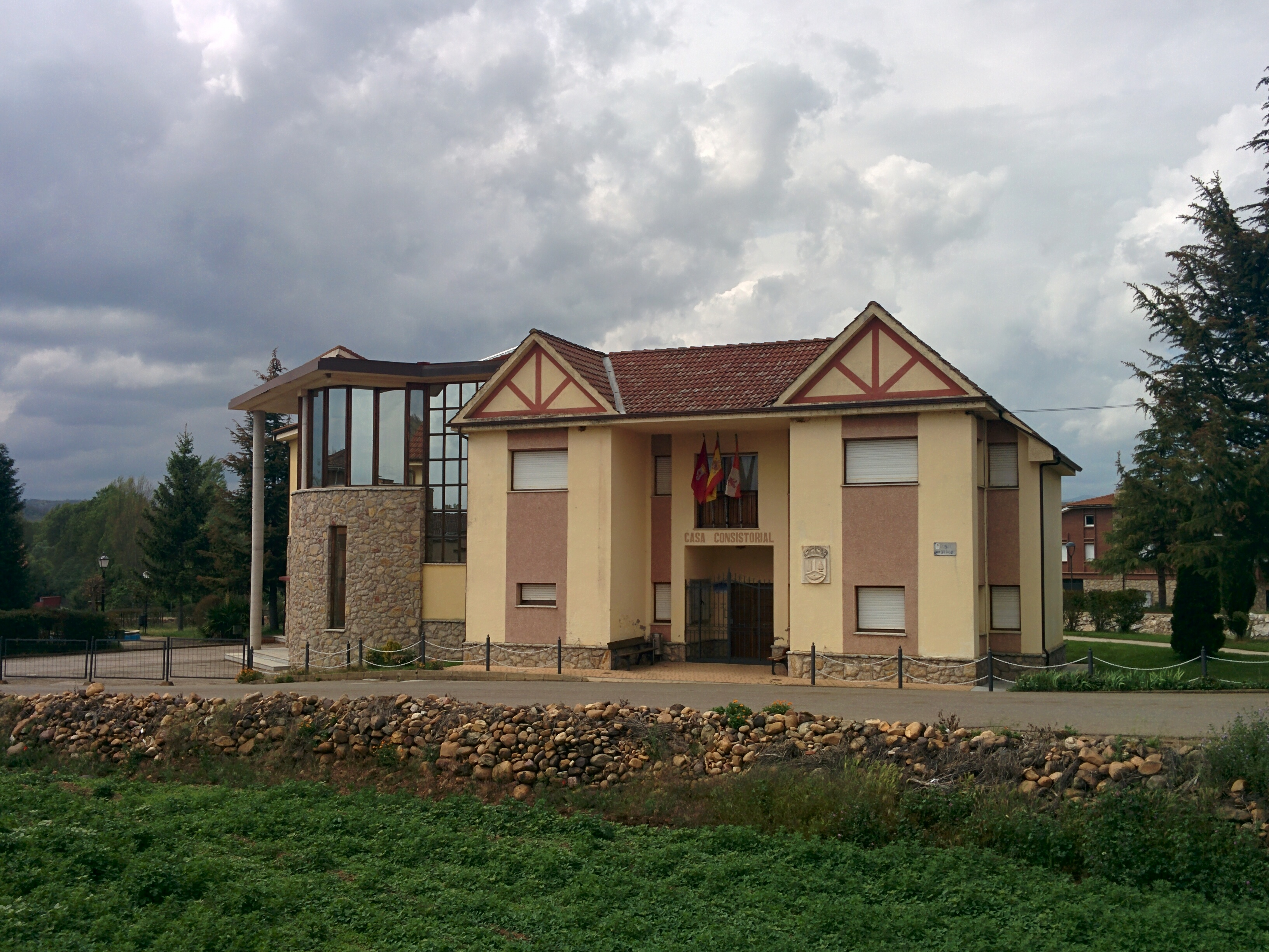 Casa consistorial de Rioseco de Tapia (León, España).